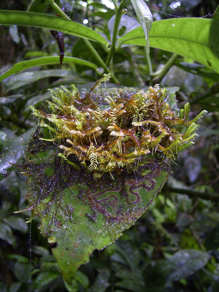 Epiphyllische Moose auf Blatt, Nationalpark Altos de Campana, Republik Panama